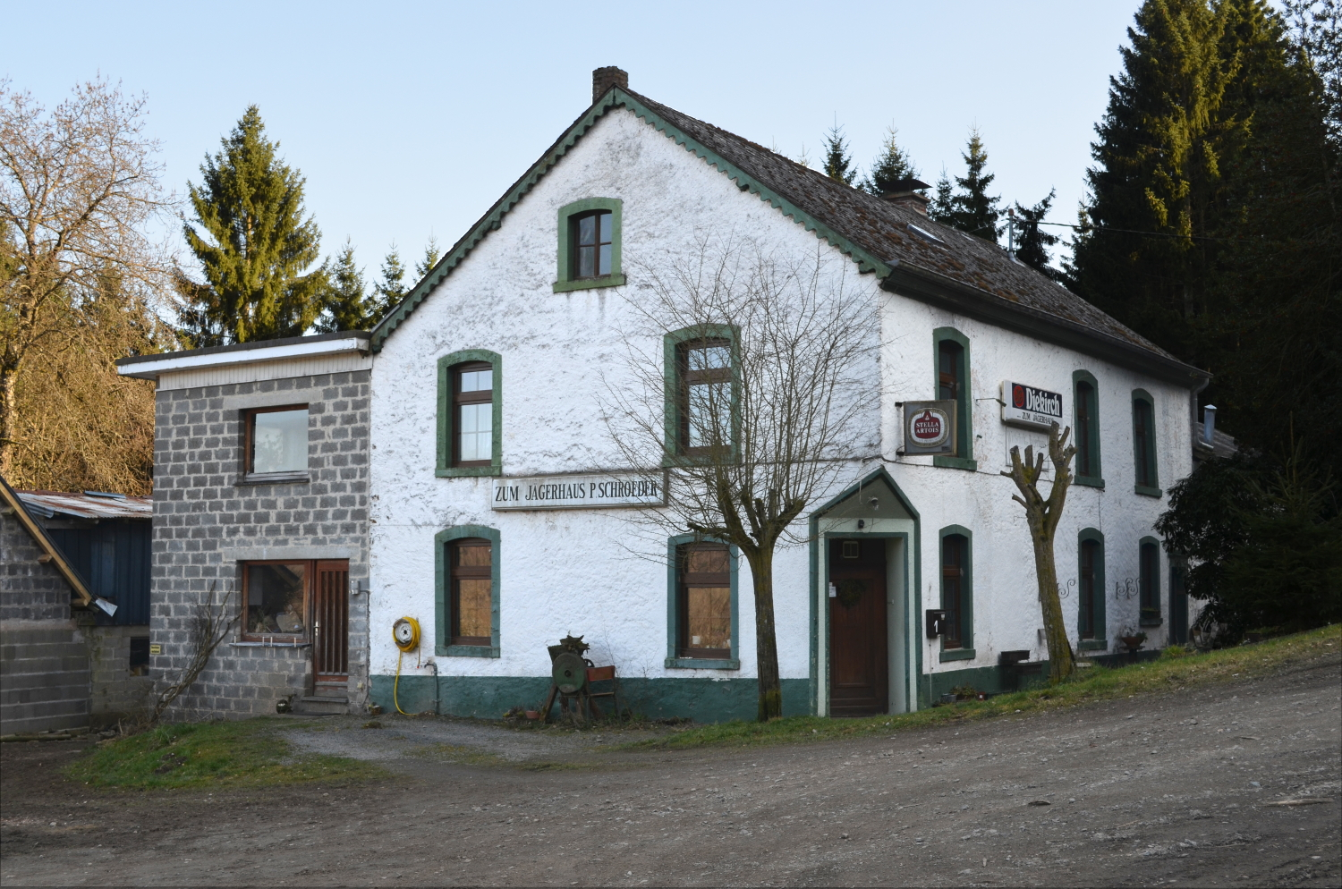 Diepert, Burg-Reuland (10.03.2014)